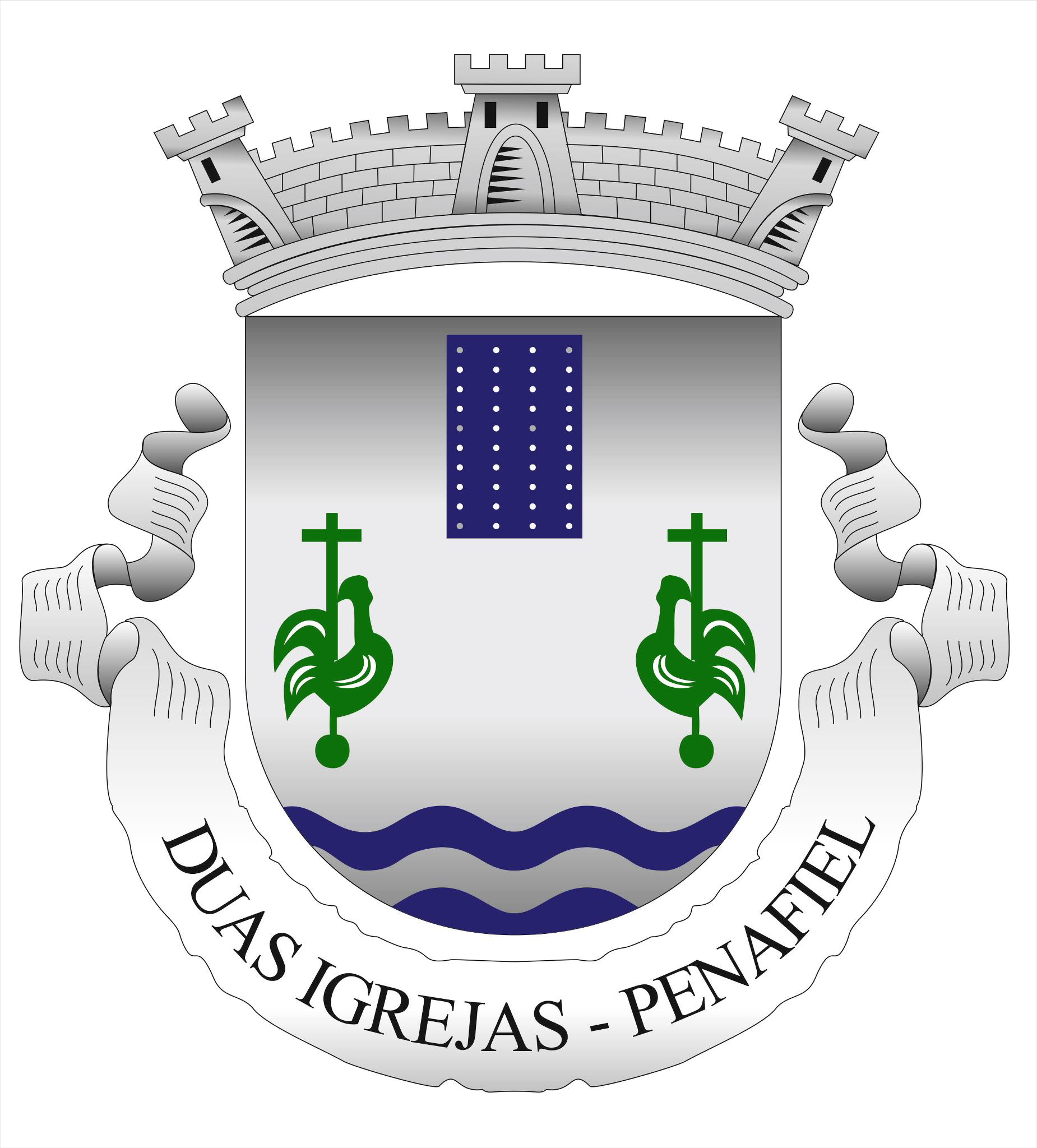 Brasão de Duas Igrejas, Penafiel